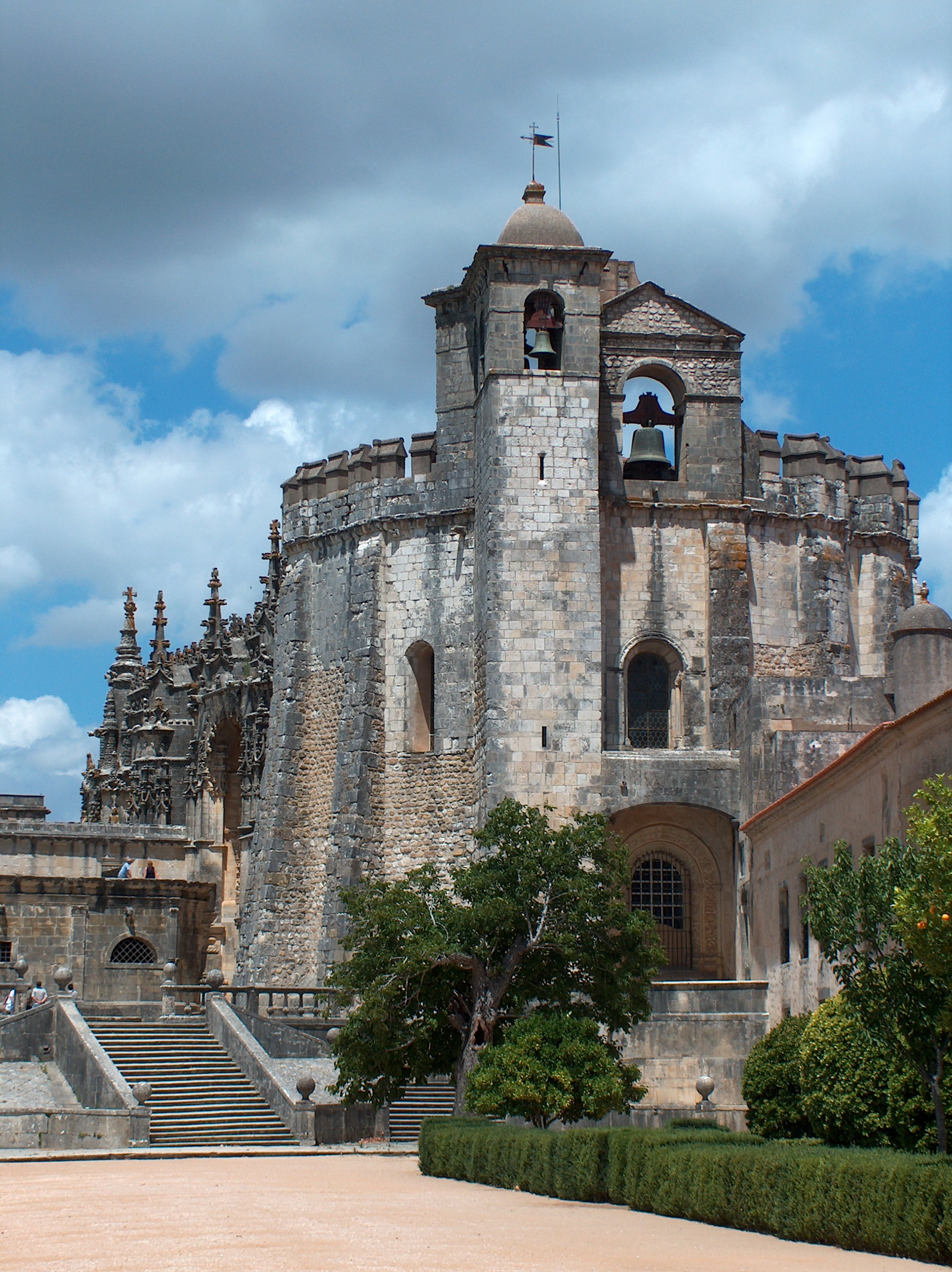 Convento de Cristo em Tomar